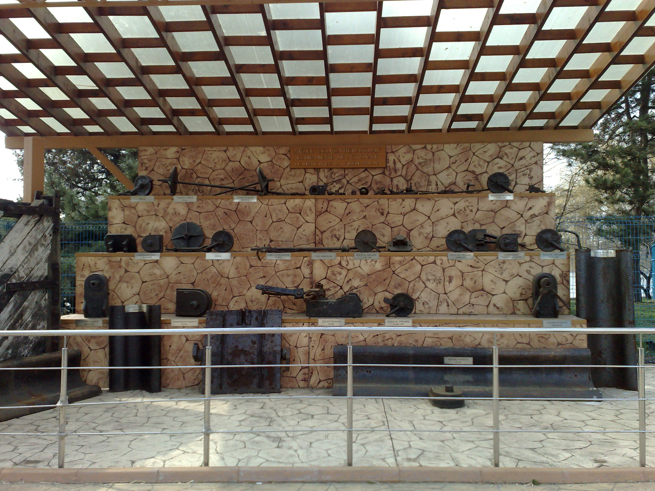 Muzeul Ecluza din Herastrau